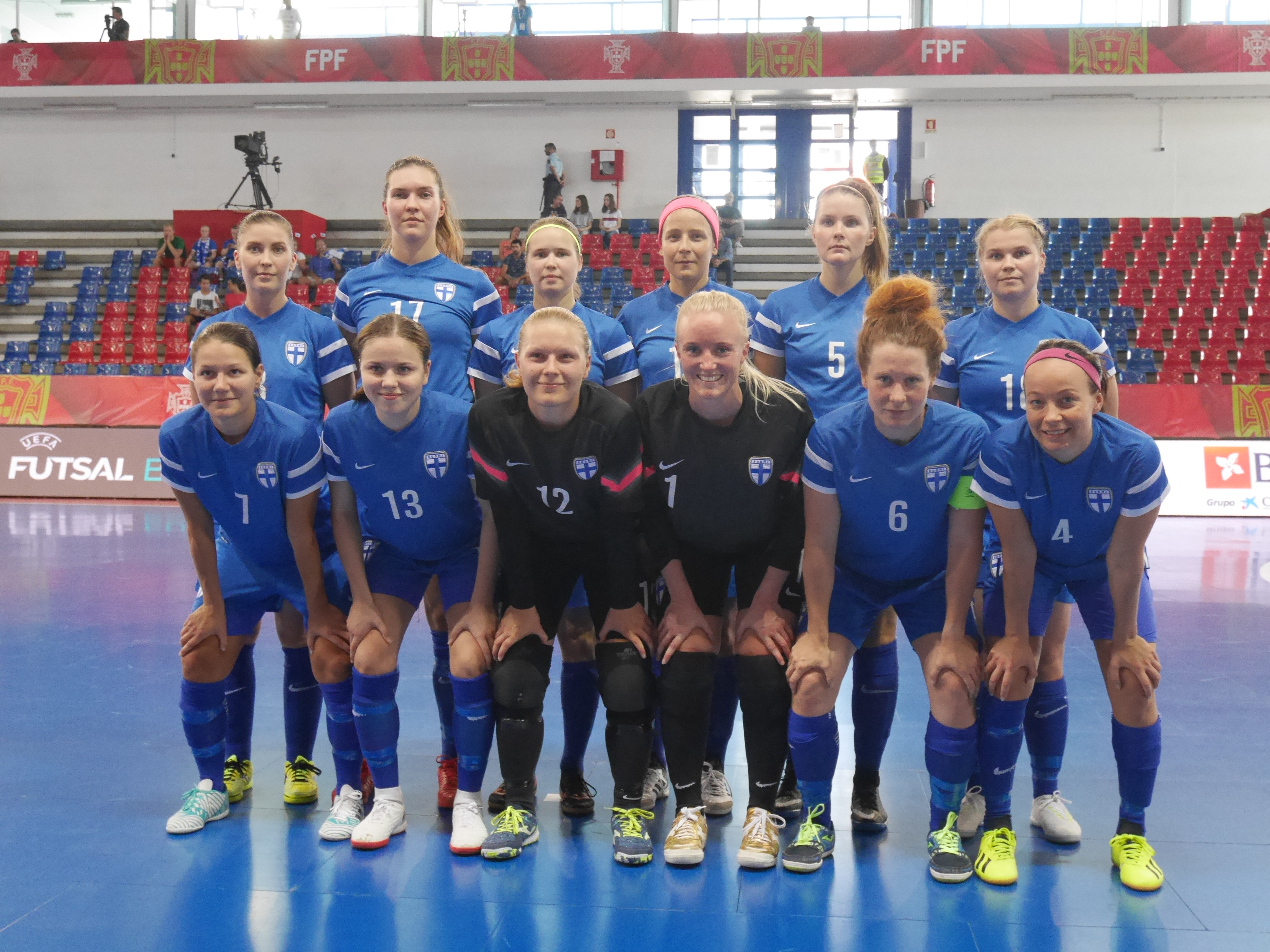 Naisten futsalmaajoukkue EM-karsinnan Main Round -kierroksen ottelussa Serbiaa vastaan Portugalissa syyskuussa 2018.